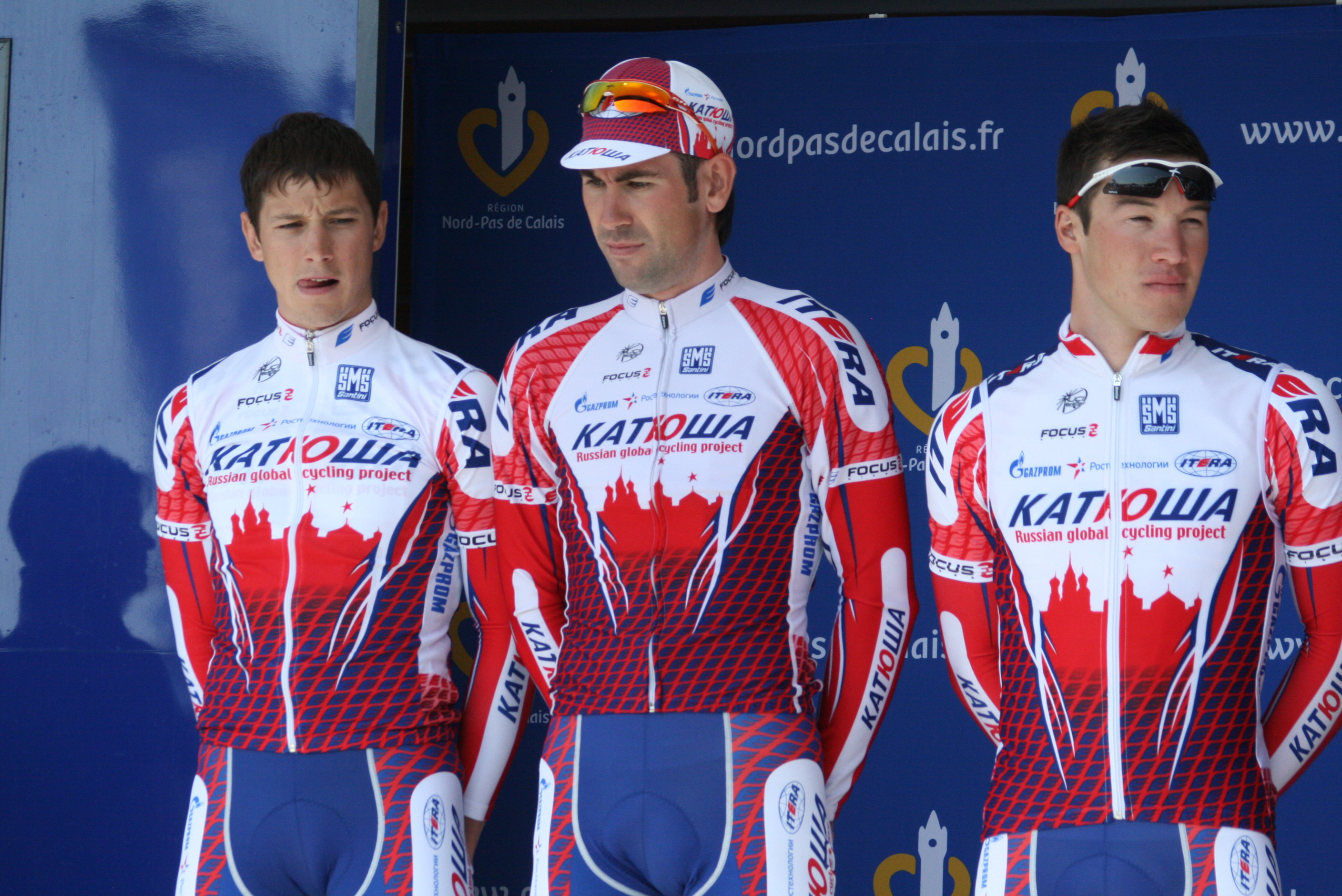 Présentation des coureurs au départ de la première étape des Quatre jours de Dunkerque 2011 Alexander Porsev, Vladimir Isaychev et Denis Galimzyanov